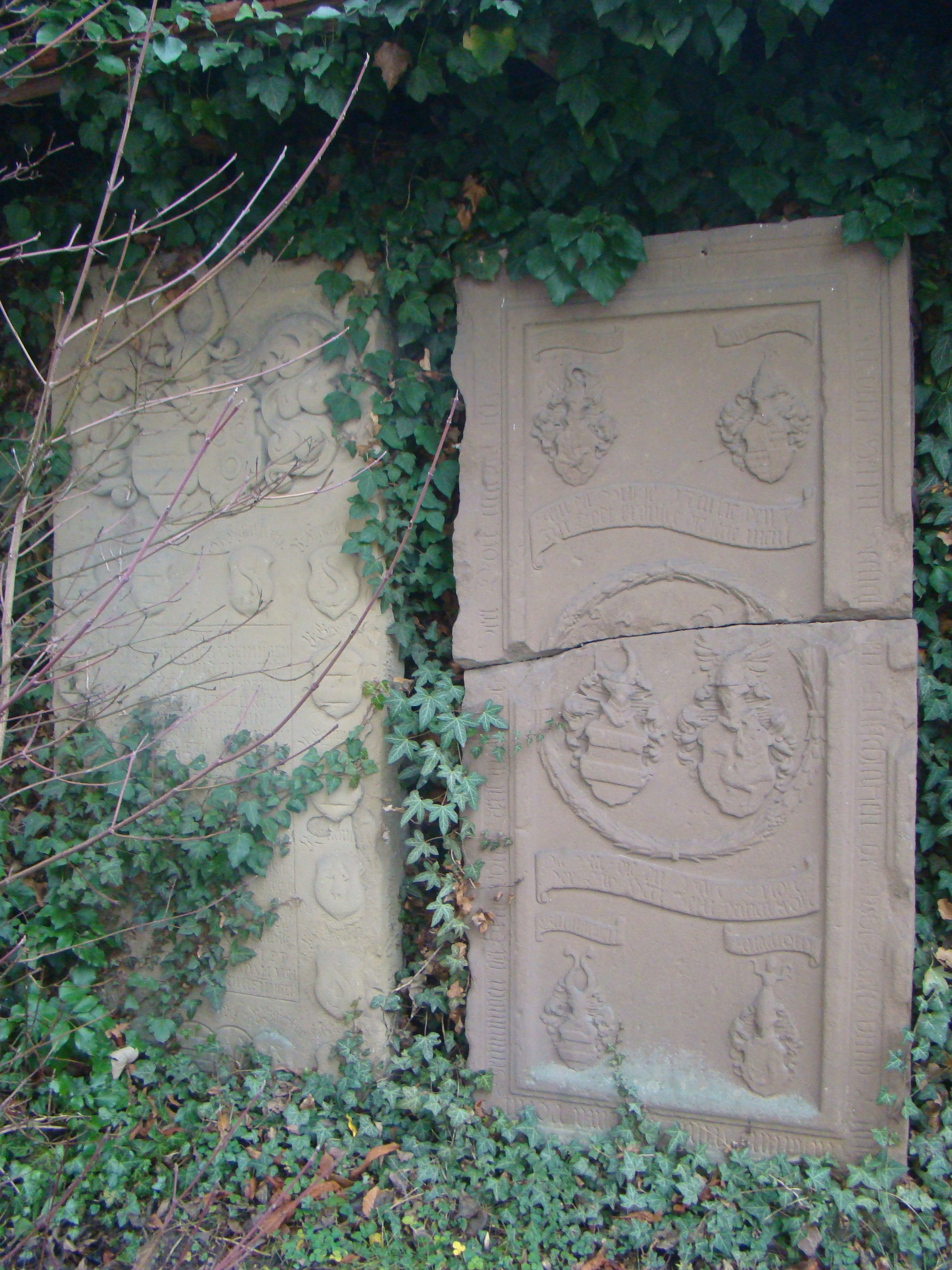 Historische Grabmale beim Unterschloss Gemmingen. Linke Grabplatte: Dietrich von Gemmingen († 1659?) und sein Sohn Johann Dietrich († 1706). Rechte Grabplatte: Barbara von Mentzingen († 1617), Gattin des Philipp Dietrich von Gemmingen (1591–nach 1637).